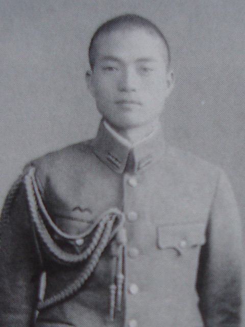 瀬島龍三,Ryuzo Sejima